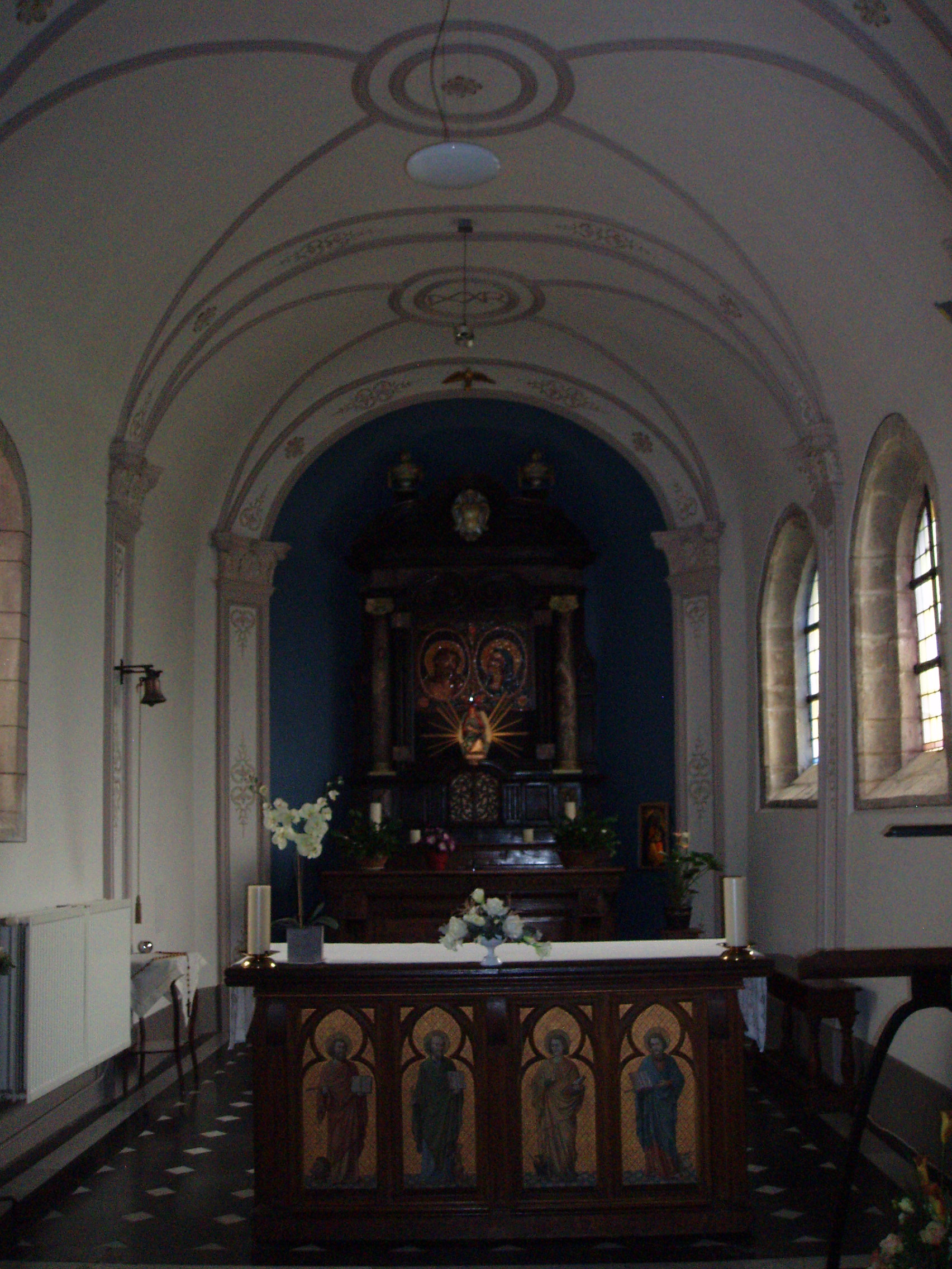 Onze-Lieve-Vrouw ten Steenkapel